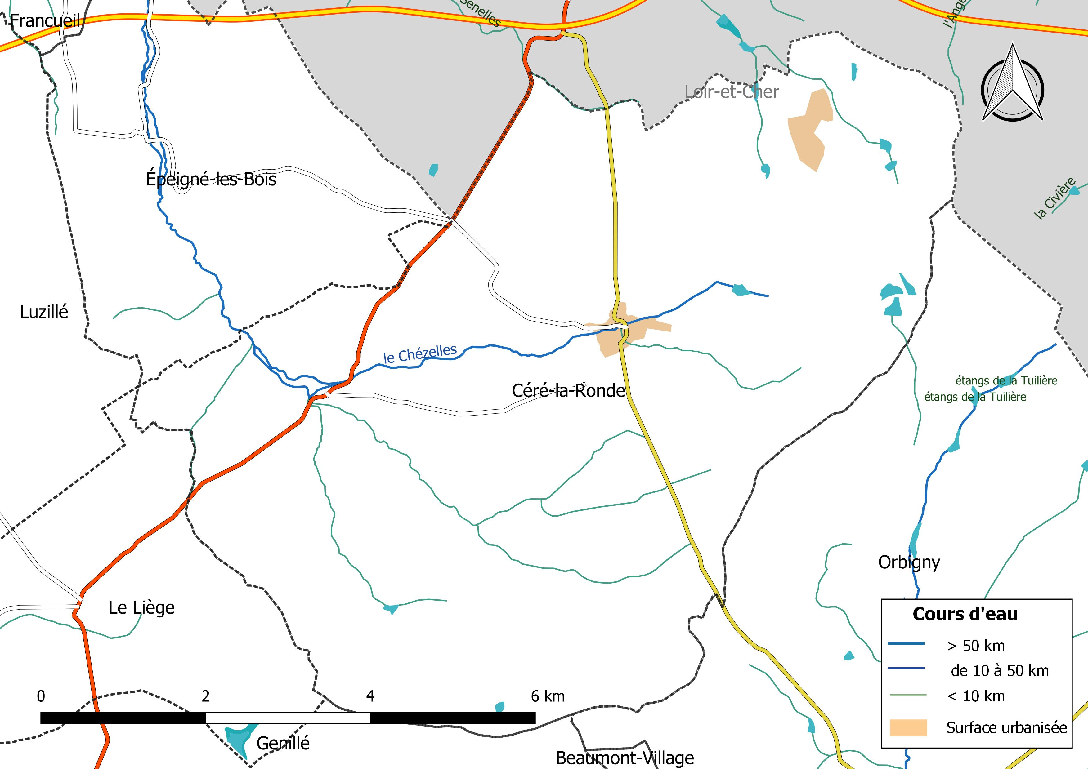 Carte du réseau hydrographique de la commune de Céré-la-Ronde (France).